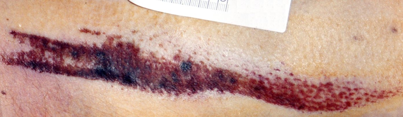 Erosió cutànea traumàtica